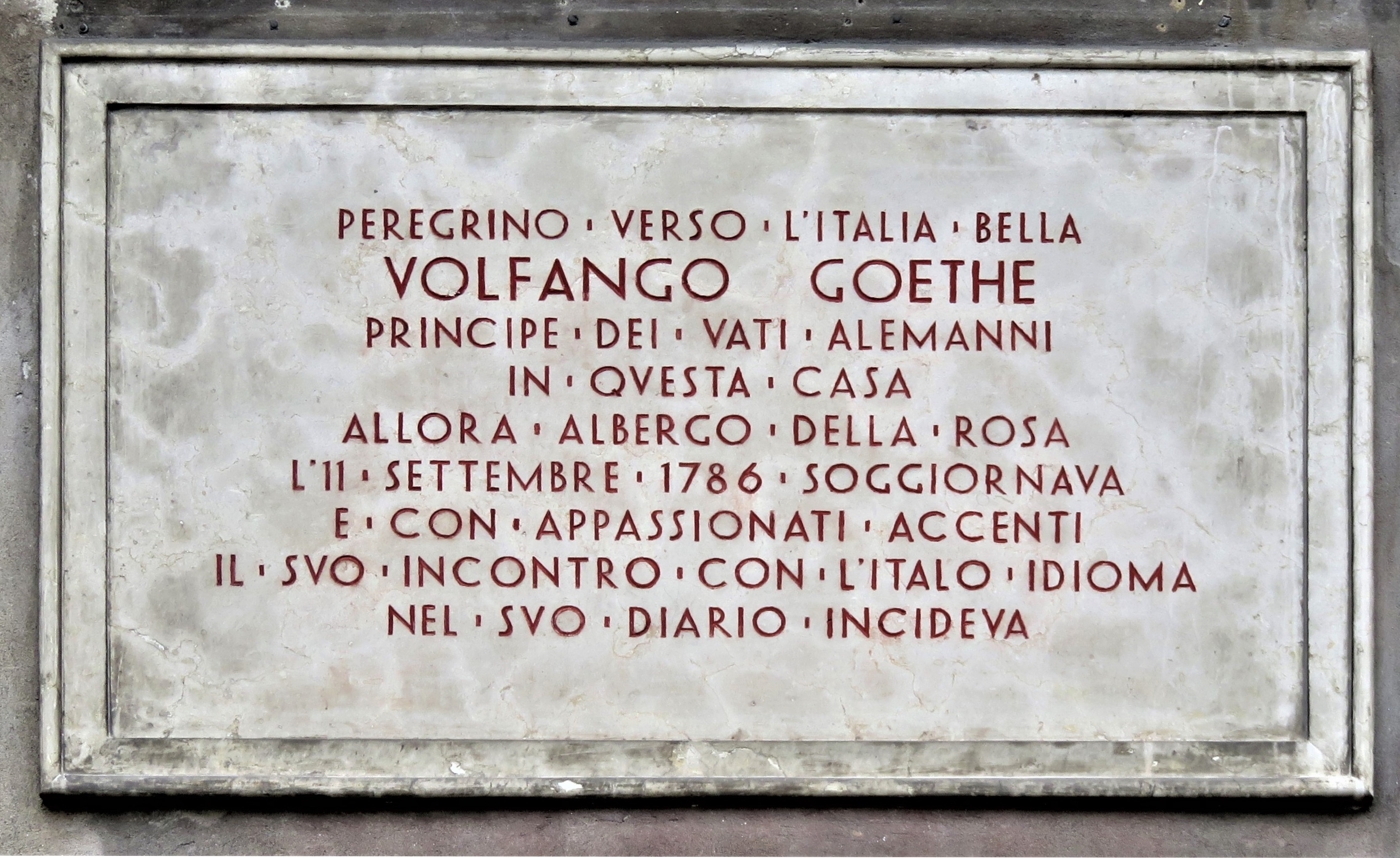 Targa Johann Wolfgang von Goethe su Casa Testori poi Candelpergher a Rovereto